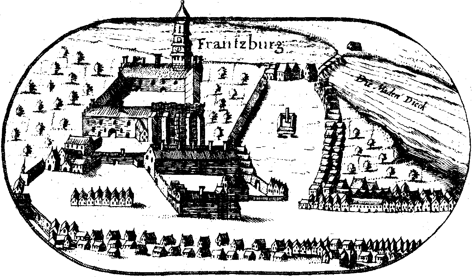 Ansicht von Franzburg (zwischen 1614 und 1617)